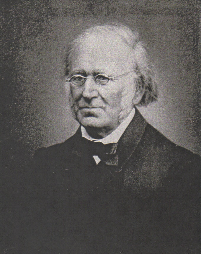 Gustav Friedrich Adolph Spitzner um 1850